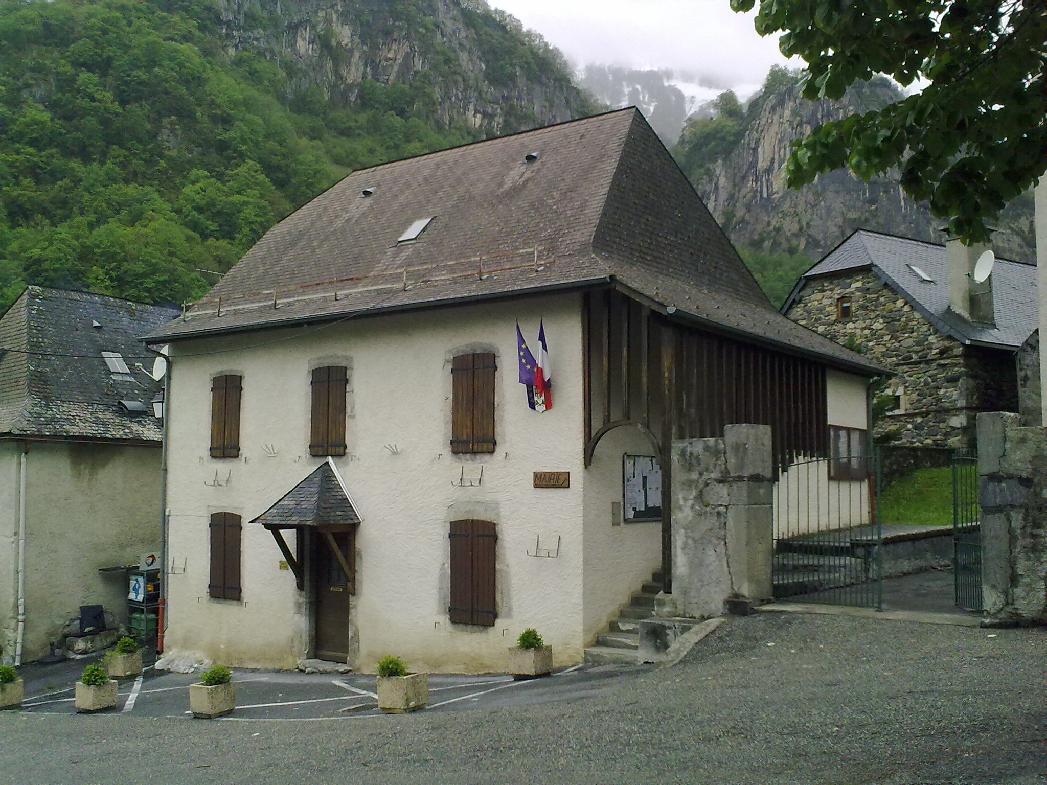 Mairie d'Etsaut (Pyrénées-Atlantiques, France).